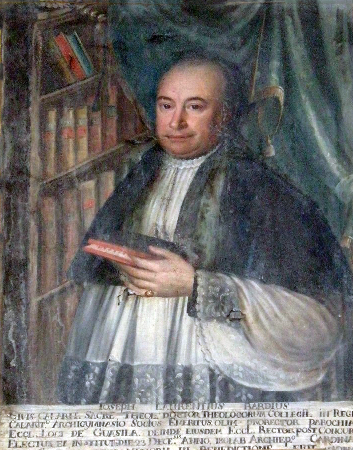 Don Giuseppe Bardi